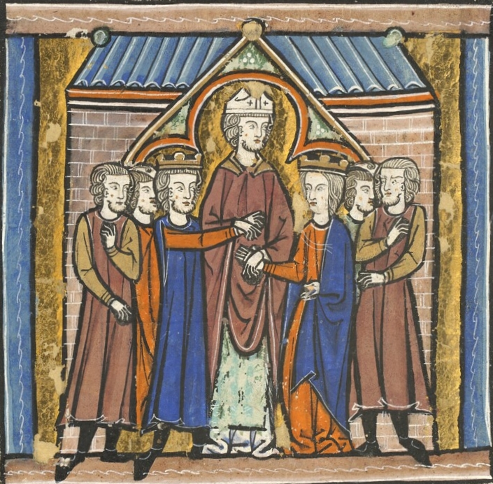 Mariage d'Amaury Ier et de Marie Comnène